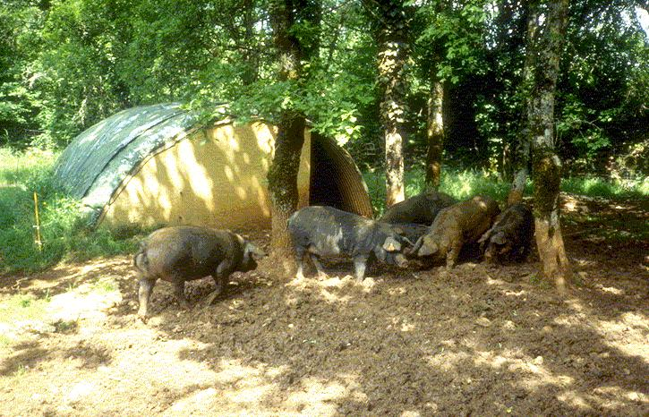 Porcs gascons engraissés sous couvert de chênes pubescents avec cabane, essai réalisé par l'Ecole nationale vétérinaire de Toulouse dans un élevage de la forêt de Caylus (Tarn-et-Garonne).